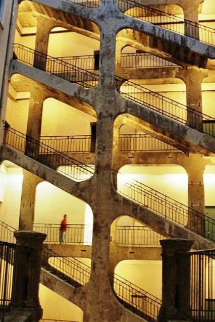 Photo des escaliers à volées libres de la Cour des Voraces, 9 place Colbert, pentes de la Croix-Rousse, Lyon 1er